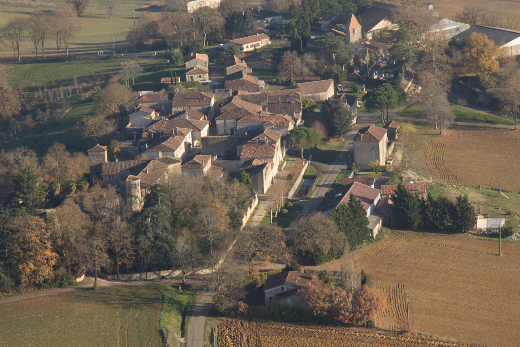 Vue aérienne du village du Mas d'Auvignon prise le 21/12/2016.